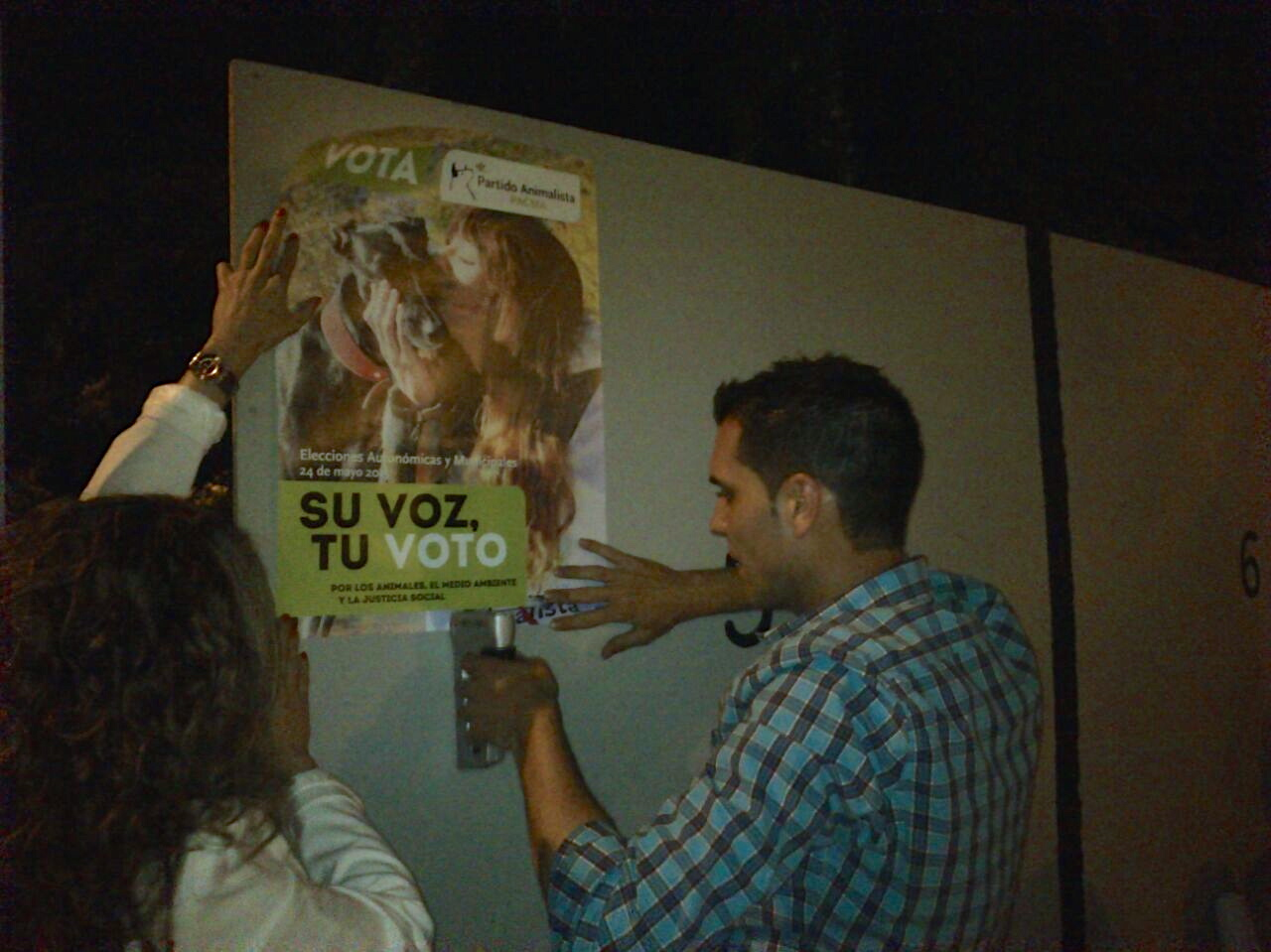 Talavera. Arranque de campaña y primera pegada de carteles. PACMA se presenta a las elecciones municipales y autonómicas del 24 de mayo del 2015 para dar voz a los animales, defender el medio ambiente y la justicia social.